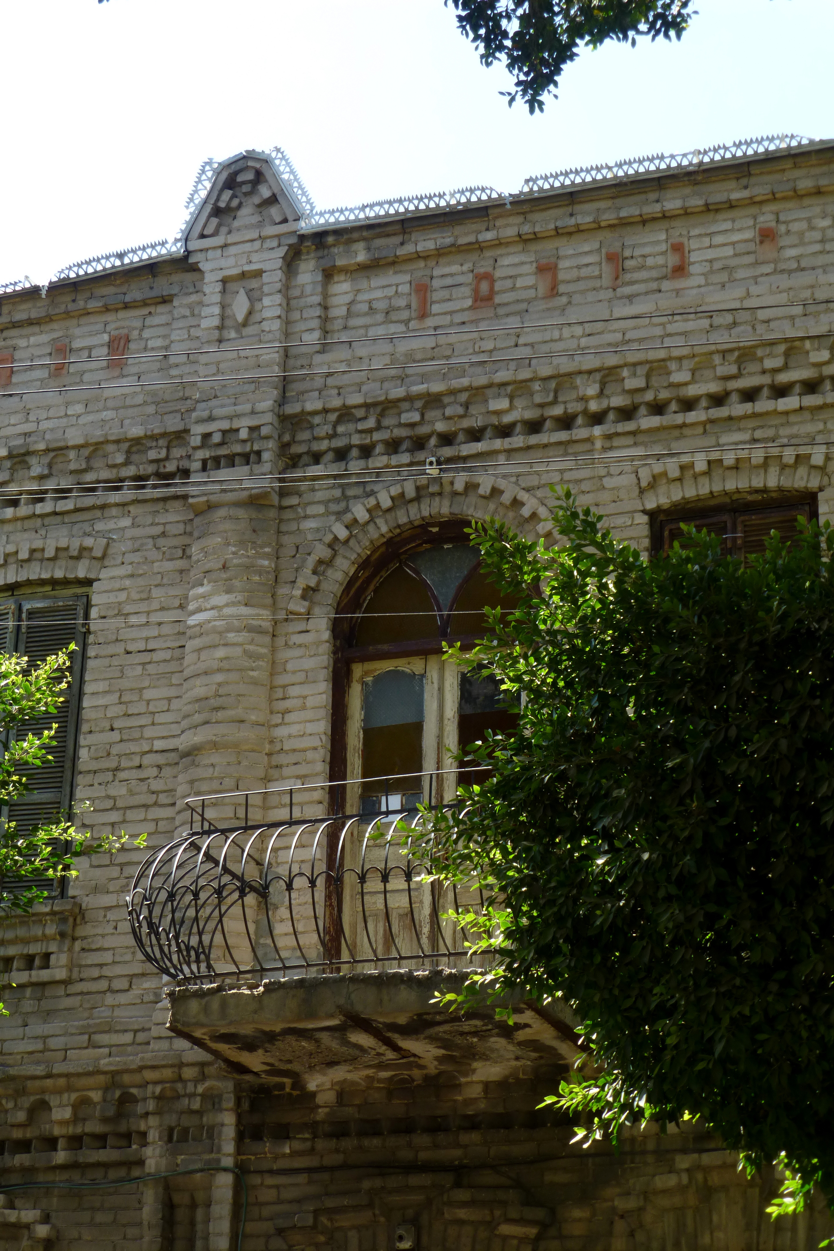 הבית, על חלקה של גודמן, נבנה בדגם בתים דומים בפולין על ידי מרדכי רוטברד ובניו.